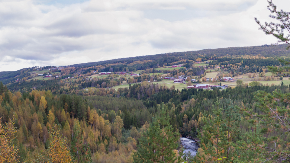 Utsikt over grenda Unset i Rendalen, sett fra vest